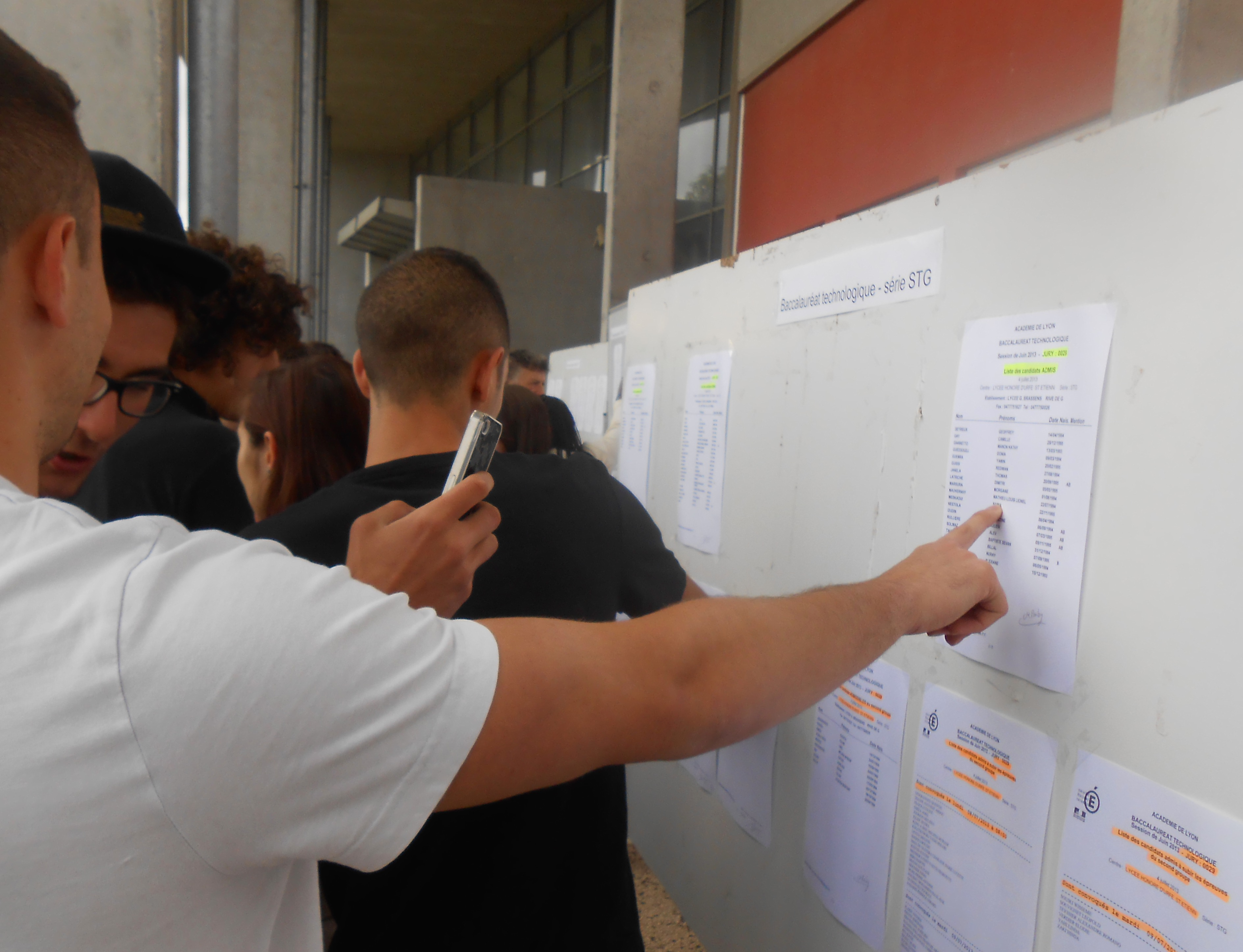 Résultats Bac 2013, lycée Claude Lebois (Saint-Chamond).